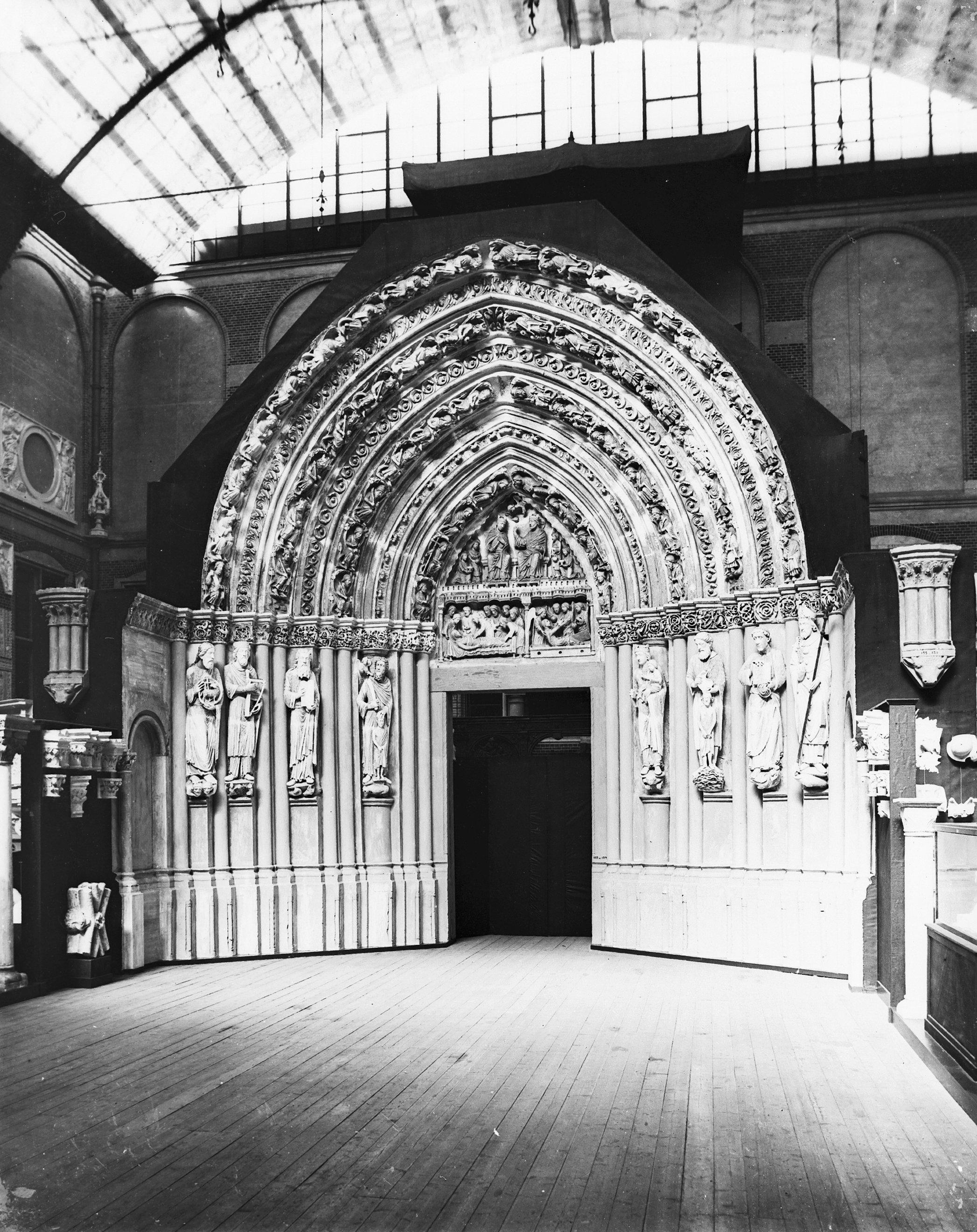 Rijksmuseum: portaal kerk St. Servaas te Maastricht zuidportaal